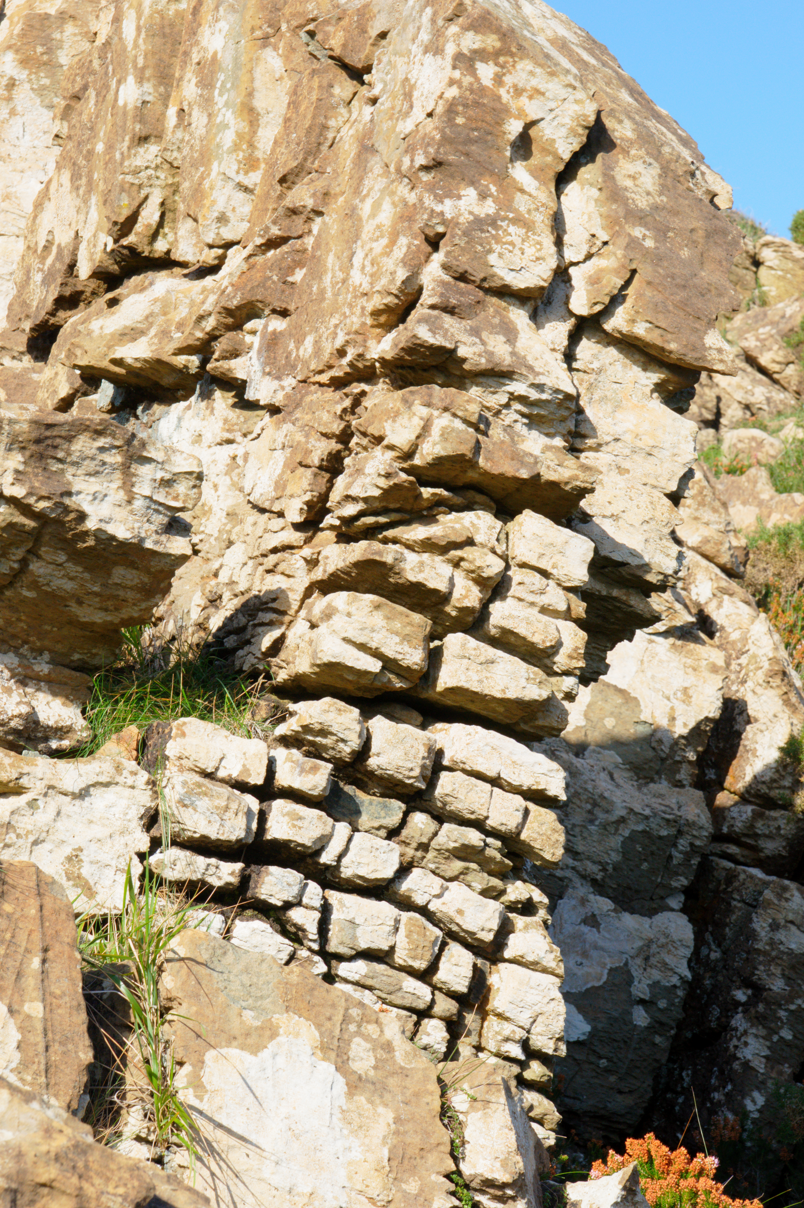 Serra da Capelada, Galicia: Karst serpentínico en peridotita ultrabasocá